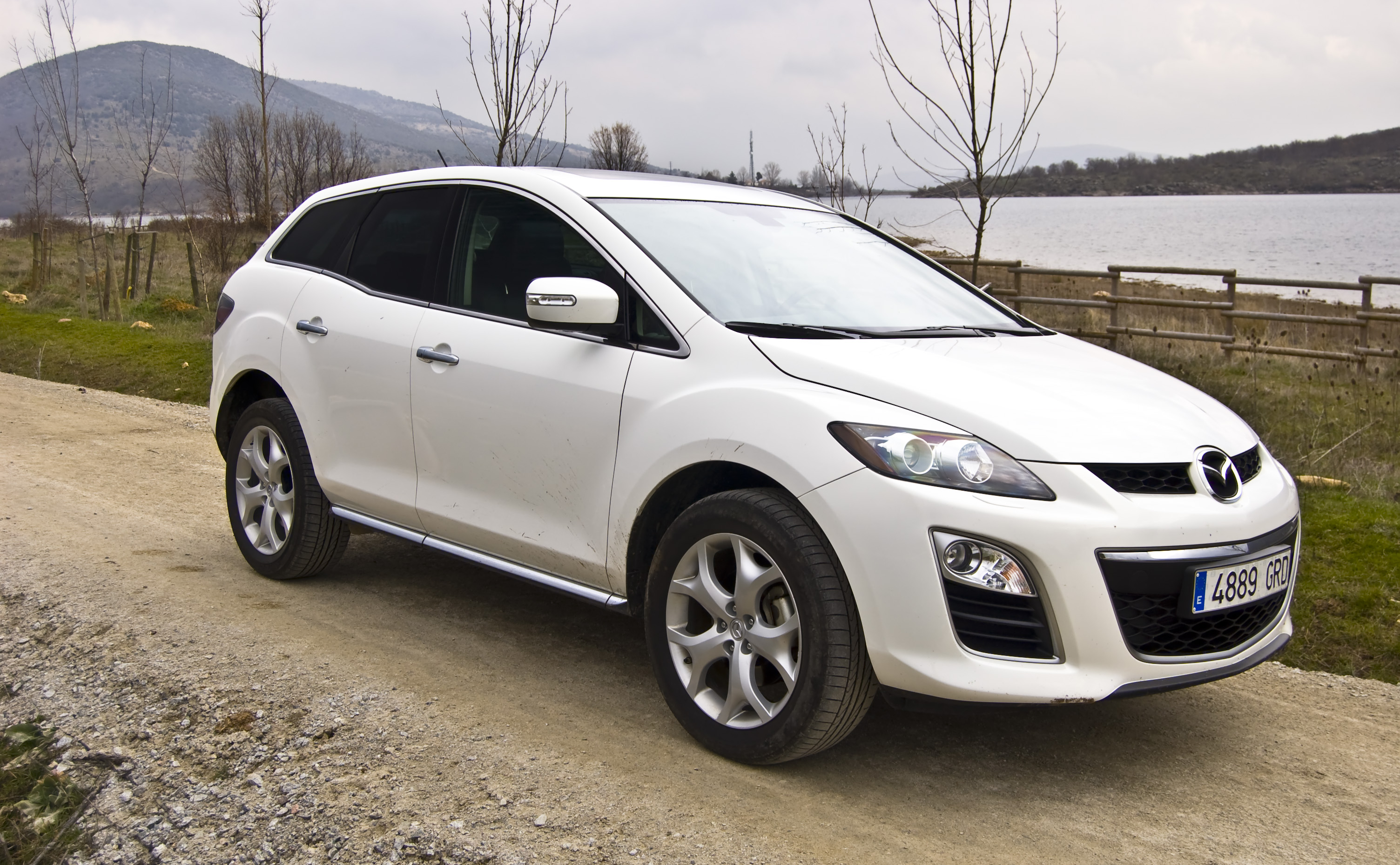 Prueba del Mazda CX-7 para Diariomotor